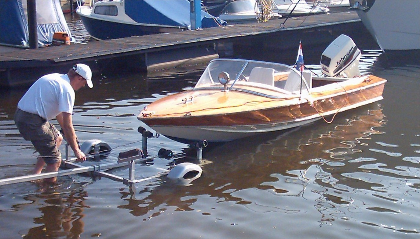 poncelet bouwjaar 1974 , haven waspik